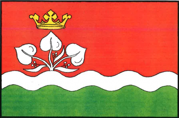 vlajka, Lupenice, okres Rychnov nad Kněžnou